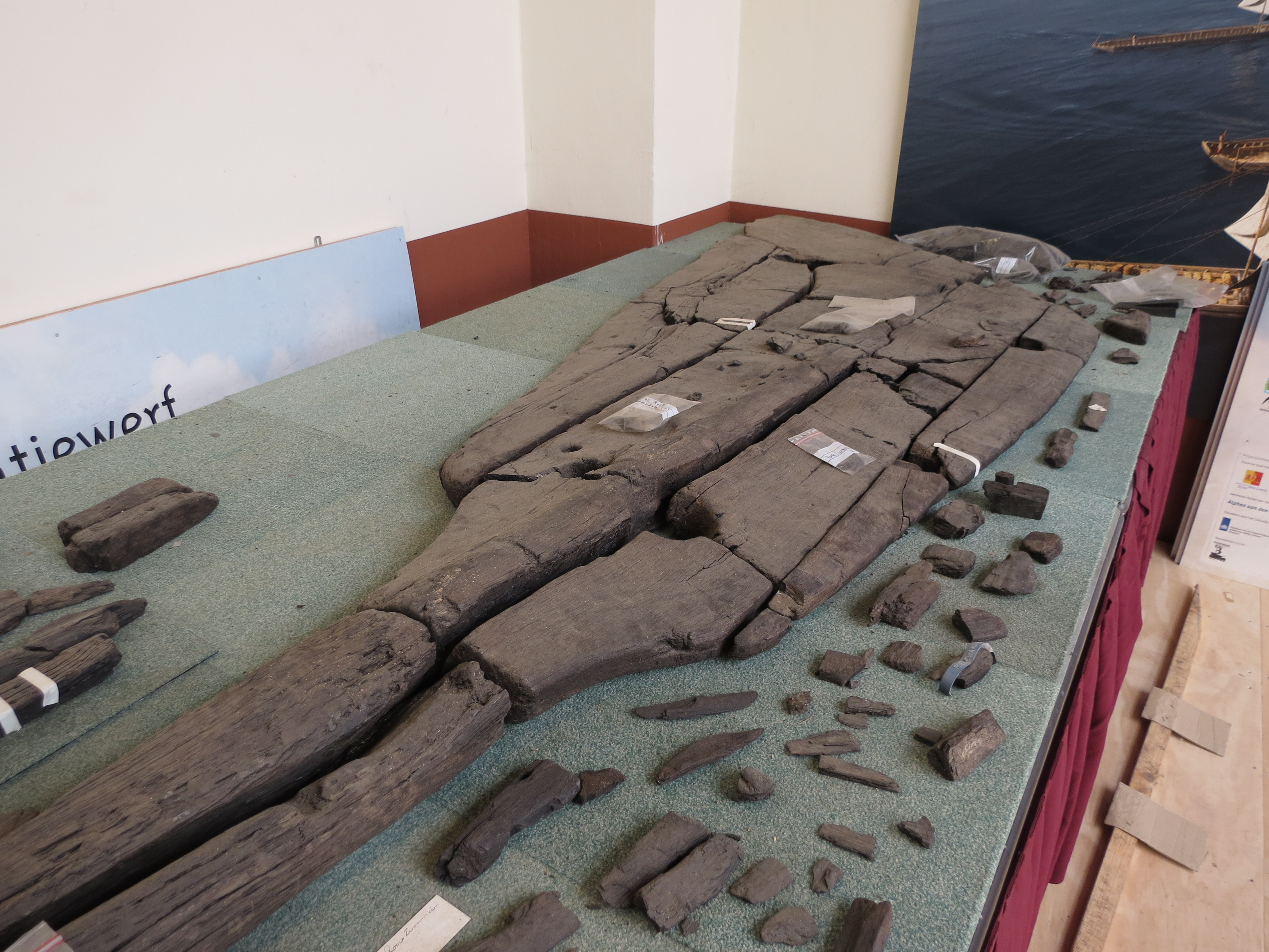 Zwammerdamschepen in Museumpark Archeon